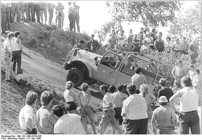 Klettwitz, 2. Geländewagen-Rallye ADN-ZB Weisflog -27.5.89 Cottbus: Moto-Cross-Auf der Moto-Cross-Strecke am Sonnenhäusel in Klettwitz fand am Wochenende die 2. Geländewagen-Ralley 4 x 4 „Durch das Lausitzer Land“ statt. Viele Besucher verfolgten aufmerksam die Prüfungsdisziplin Halten und Anfahren der Fahrer am Steilhang.